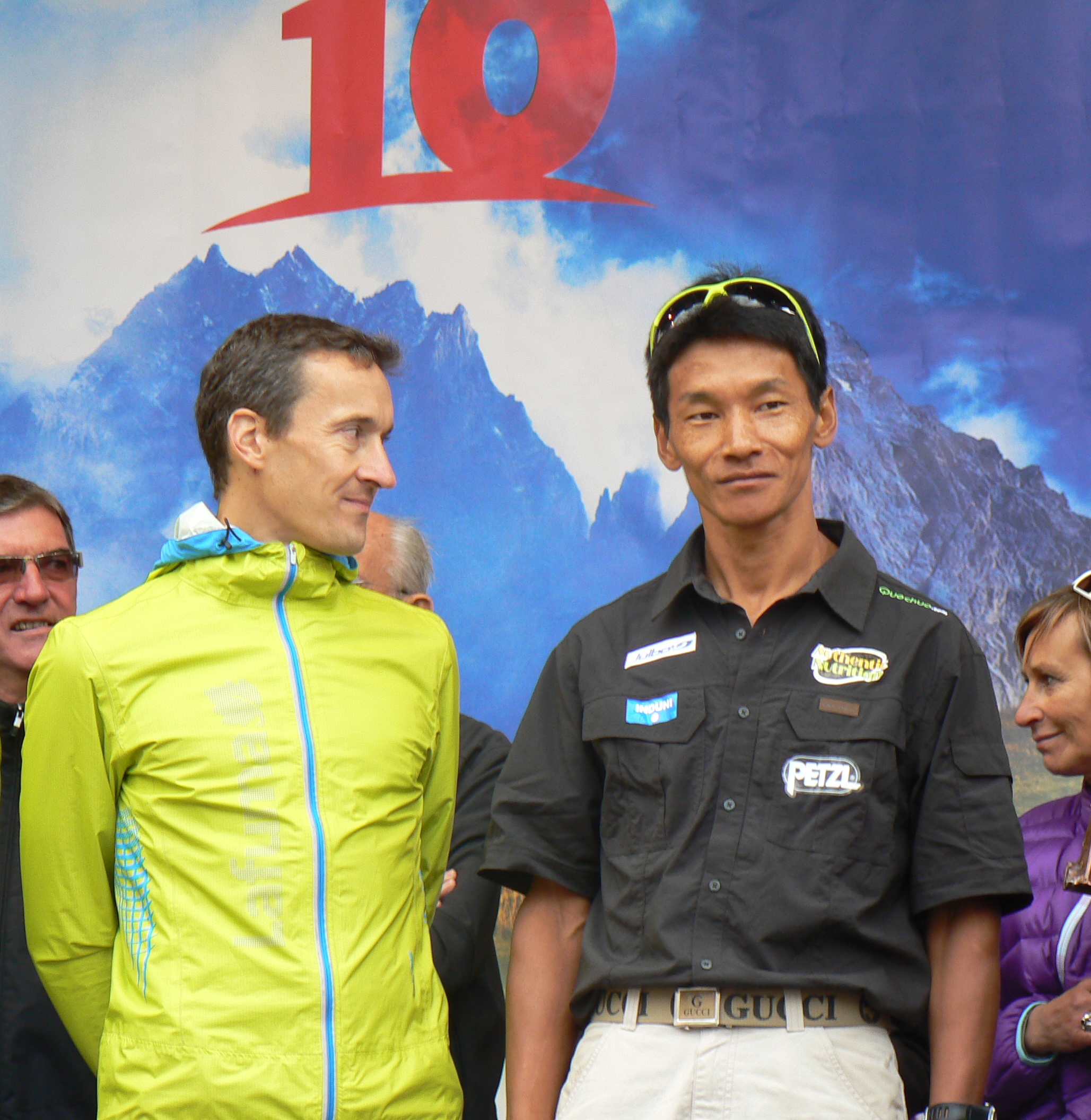 Premiazione dei vincitori della quarta edizione della TDS -Traces des Ducs de Savoie, Ultra-Trail du Mont-Blanc 2012. Dewa Sherpa ha vinto, seguito da Lionel Trivel e Antoine Guillon.